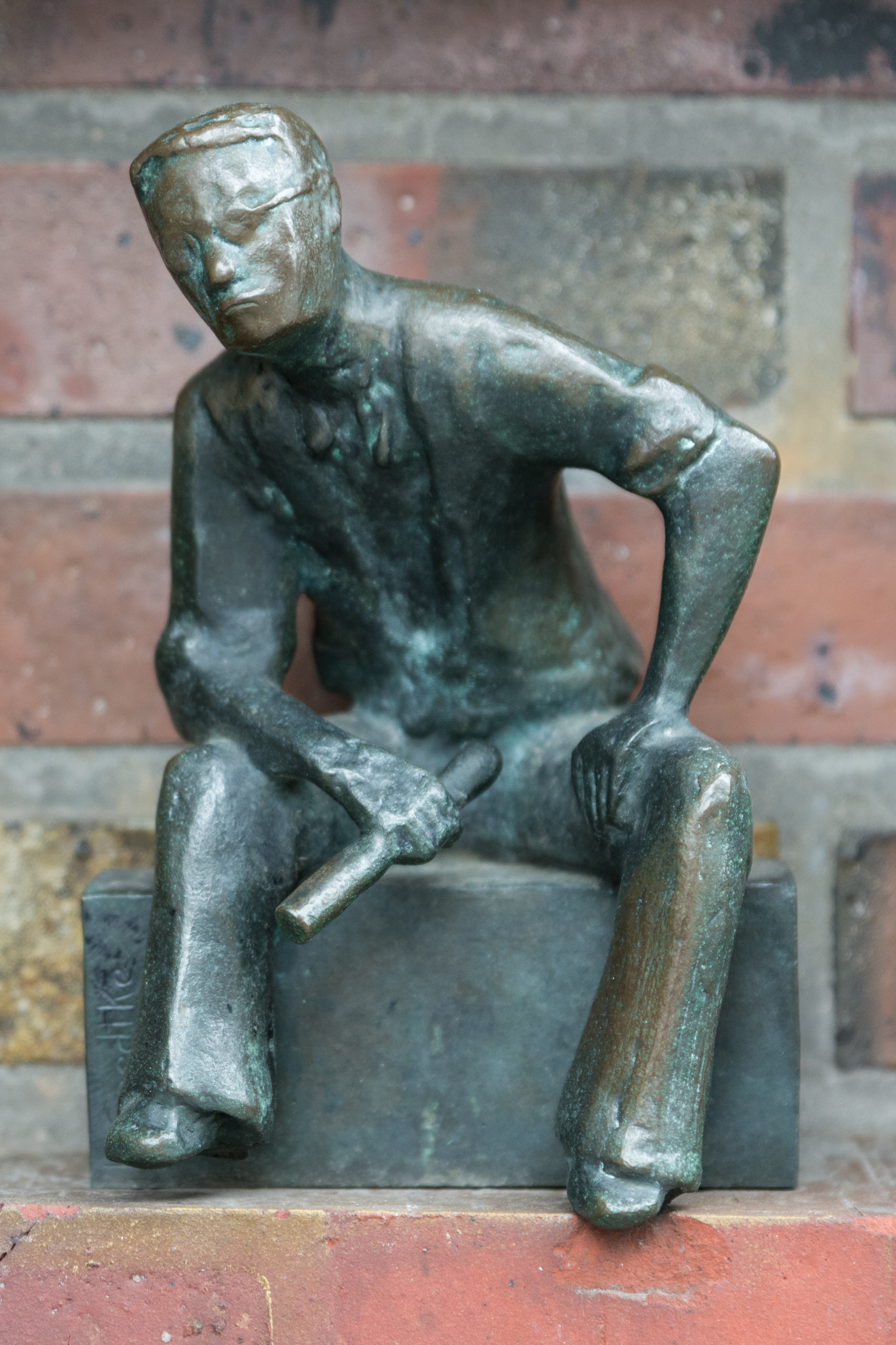 Bronzefigur des Architekten Fritz Höger am Broschekhaus in Hamburg-Neustadt. This is a photograph of an architectural monument.